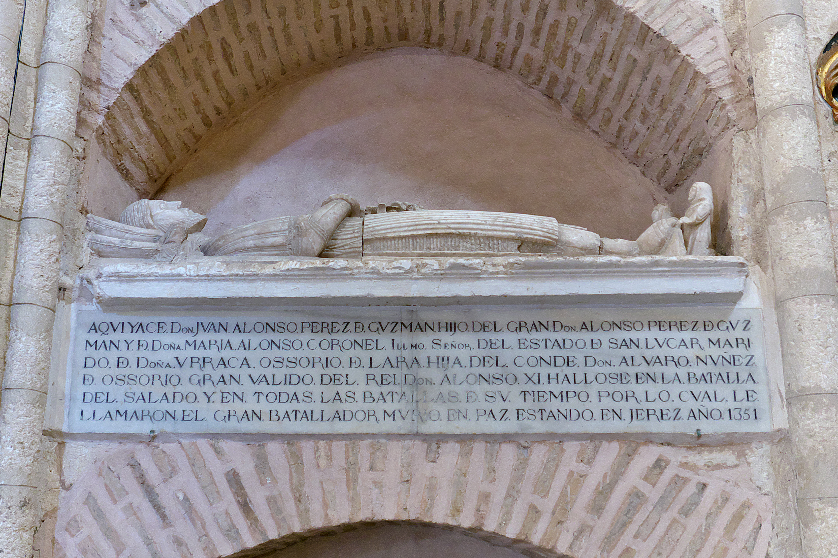 Monasterio de San Isidoro del Campo (Santiponce). Muro del Evangelio de su capilla en el monasterio jerónimo. Este sepulcro no ocupa su ubicación primitiva.